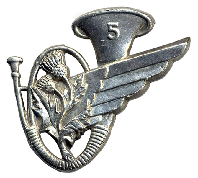 Insigne du 5e bataillon de chasseurs à peid